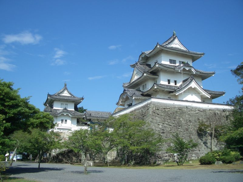 伊賀上野城 2005年8月20日投稿者撮影